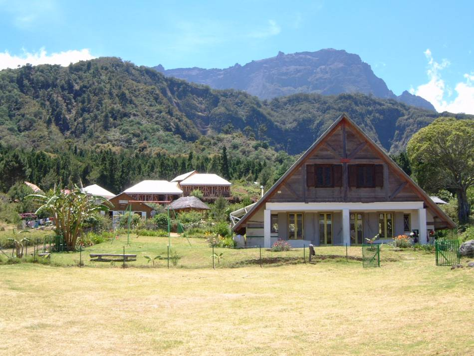 Photo prise par Nerijp le 23 novembre 2004. Elle est libre de droit d'après cette page.